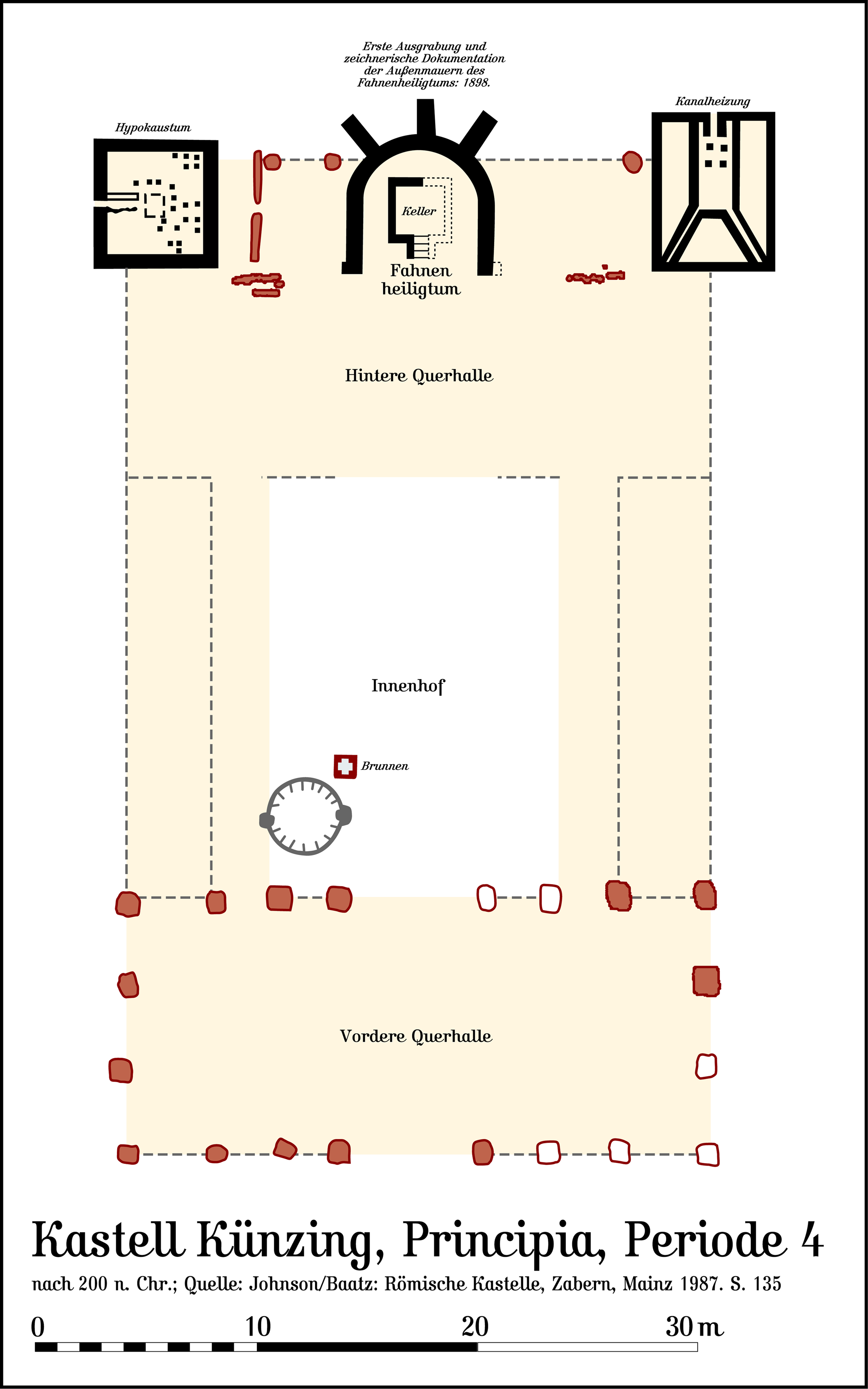 Kastell Künzing, Periode 4, Principia, nach 200 n. Chr. Nähere Quellenangabe befindet sich direkt im Bild.